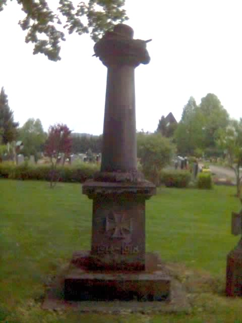 Kriegerdenkmal in Lindau (Eichsfeld)